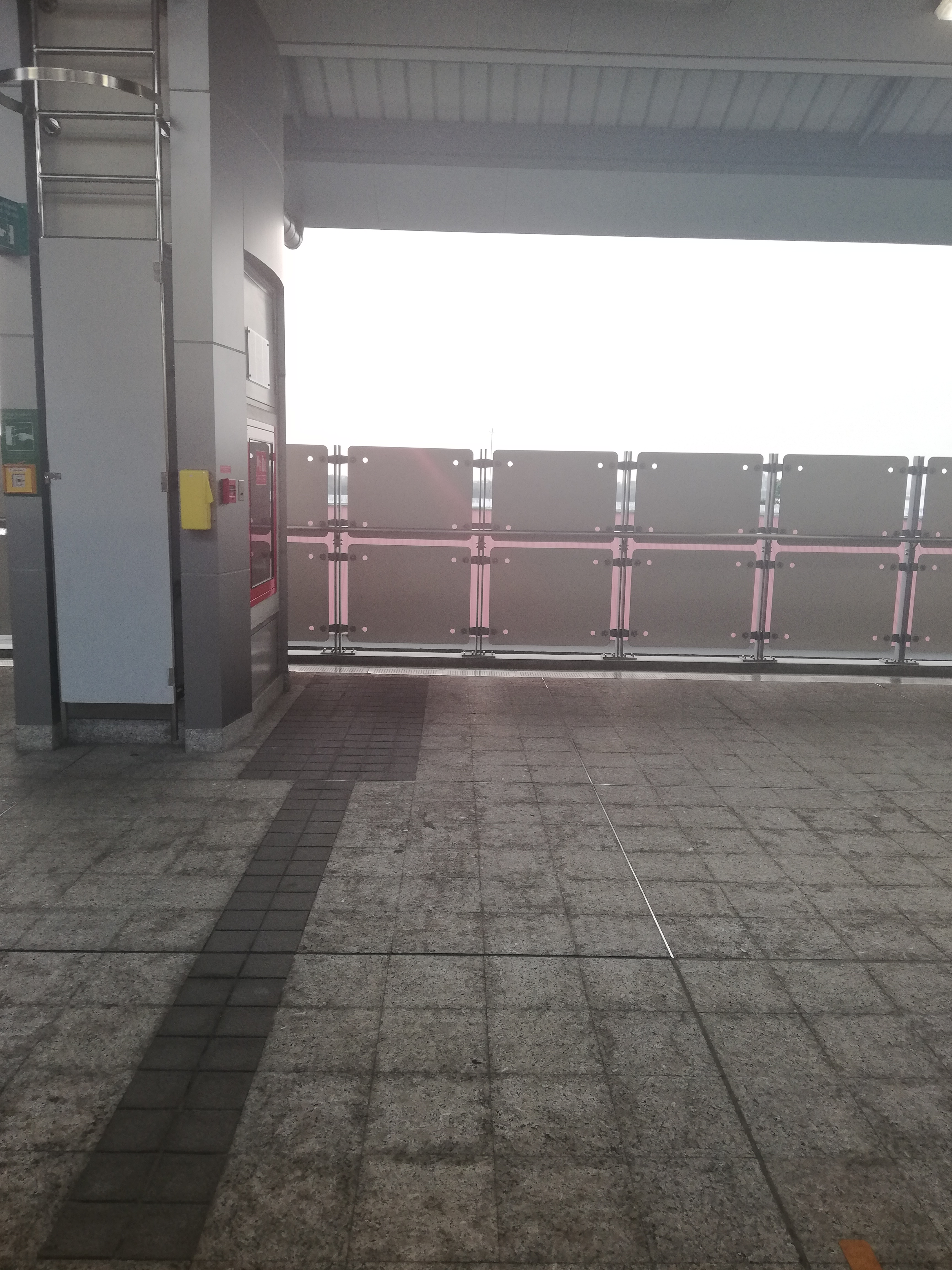 แผงกั้นระดับสายตา ชานชาลาที่ 2 สถานีโรงเรียนนายเรือ